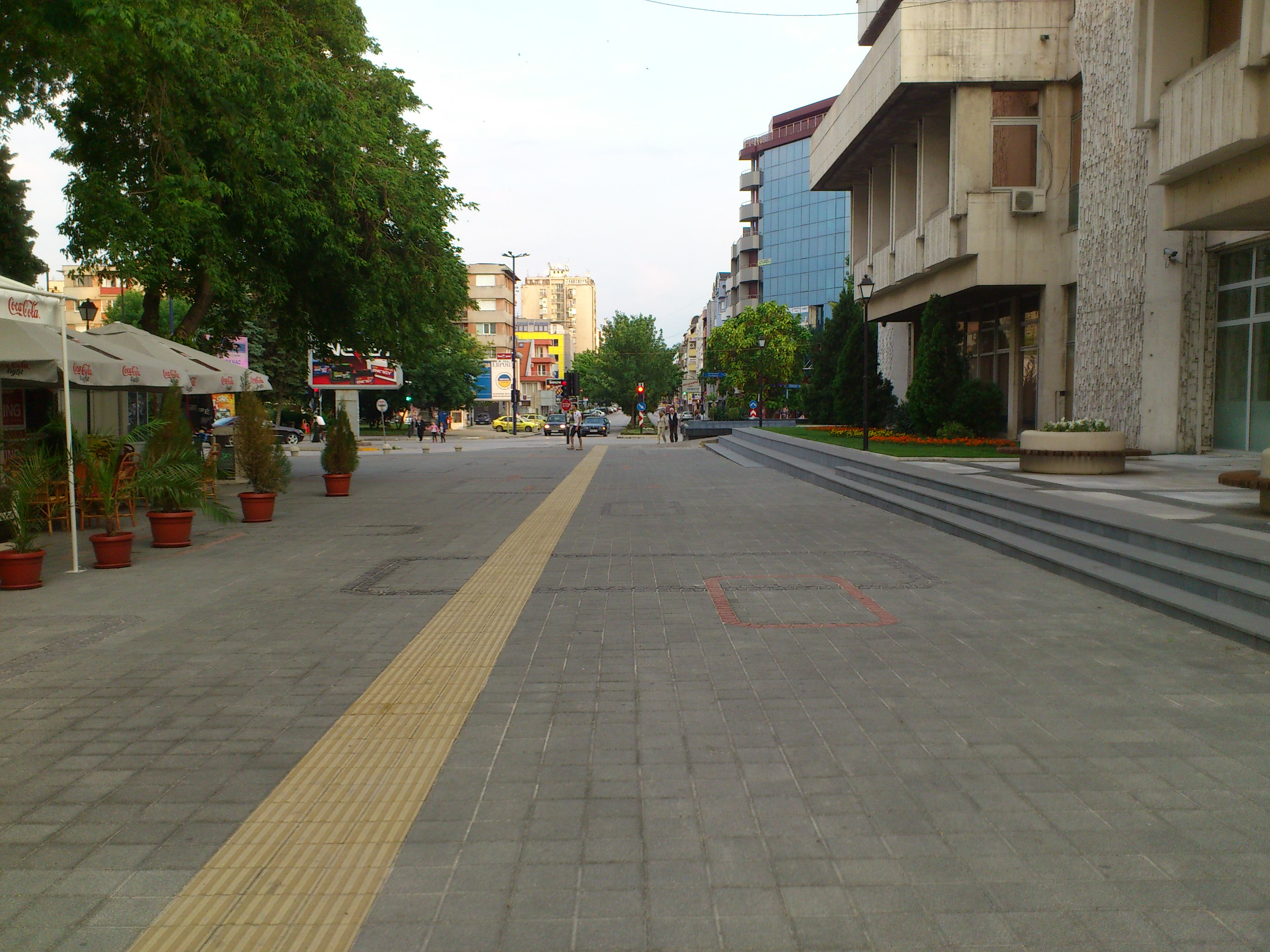 Pazardjik